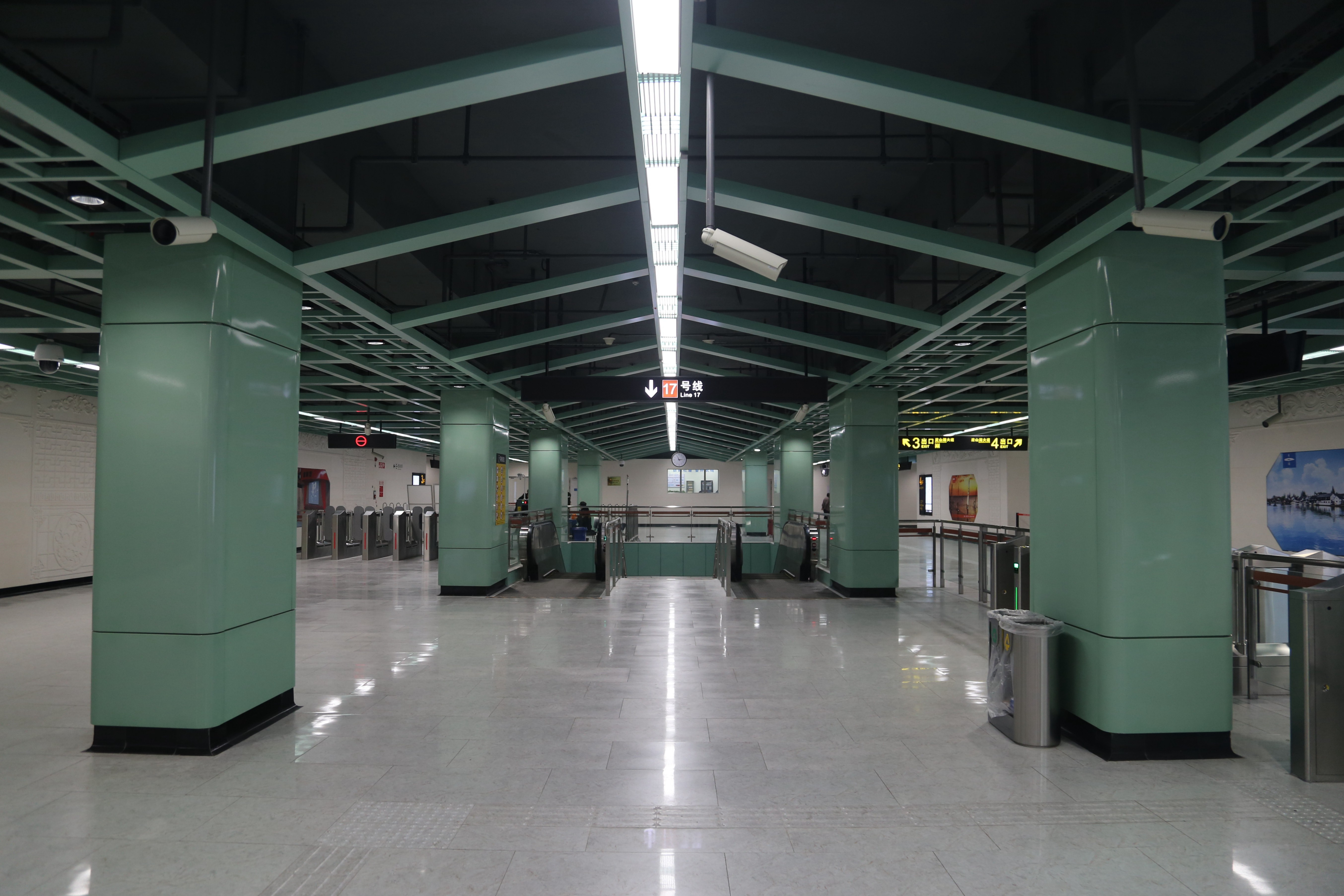 淀山湖大道站站厅